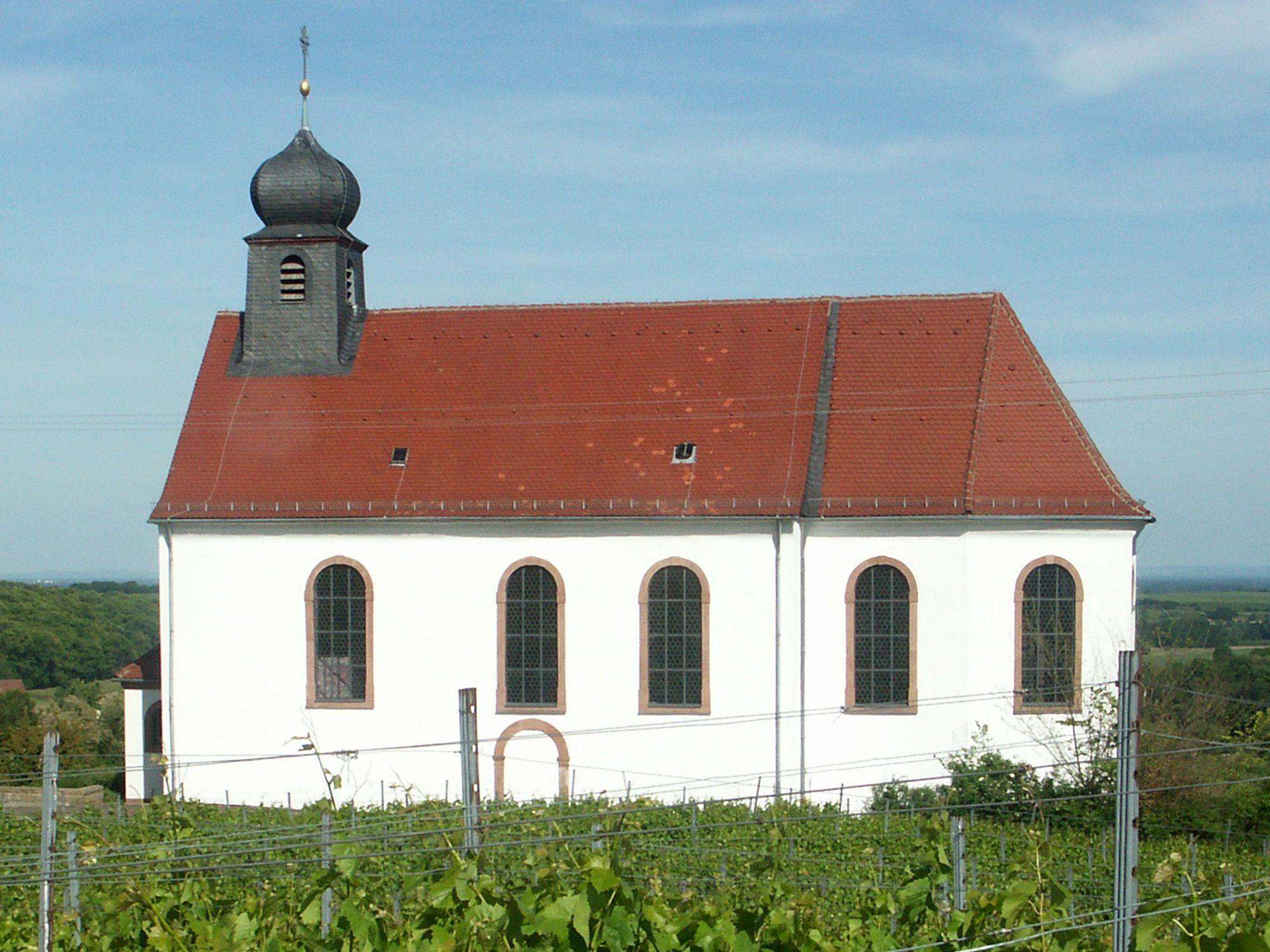 Dionysiuskapelle bei Gleiszellen